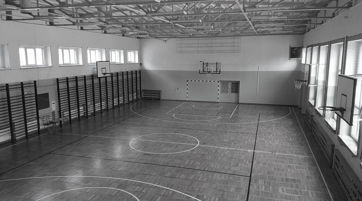 Stargard. Sala gimnastyczna Gimnazjum nr 1 na Popiela